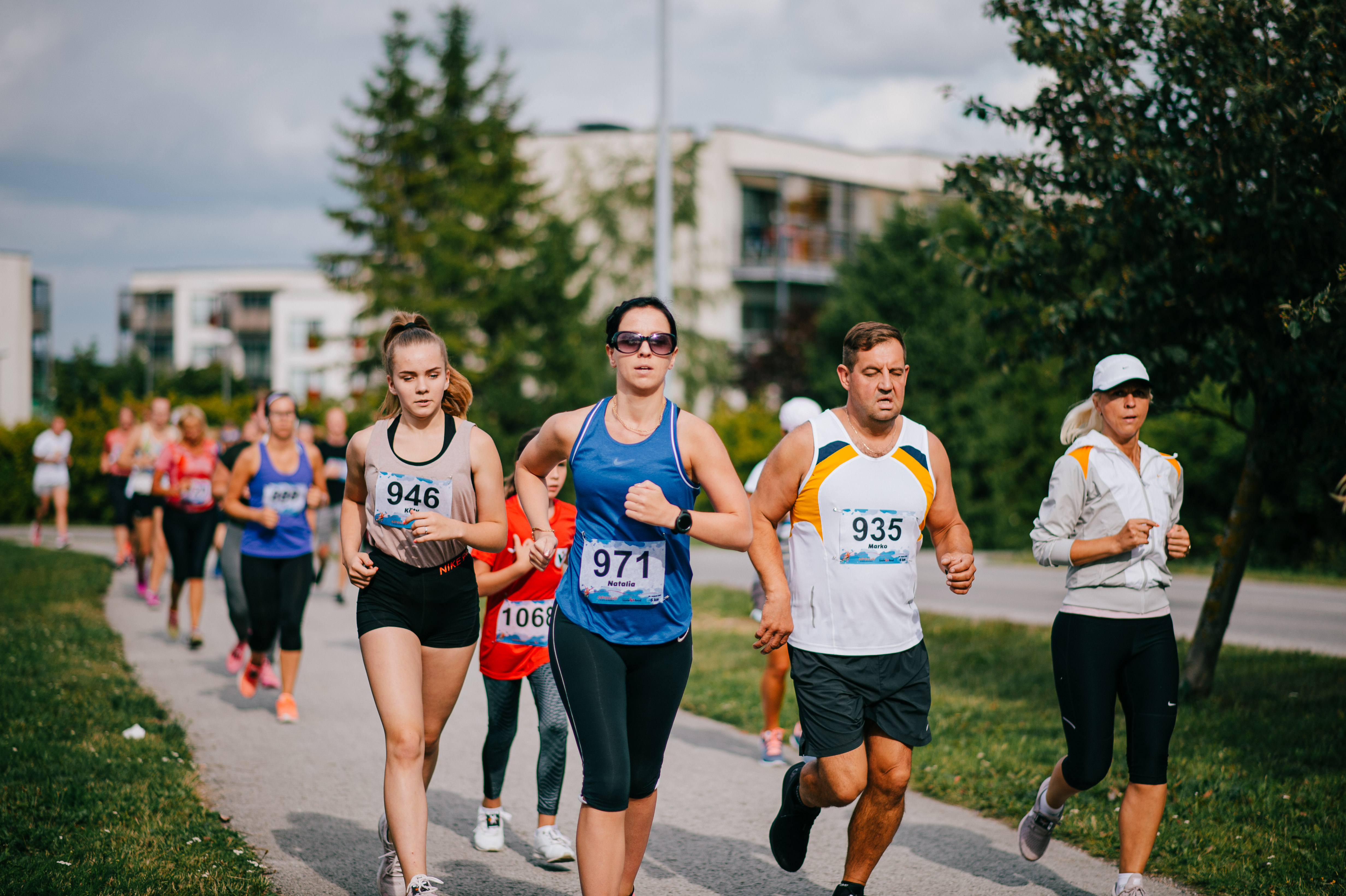 Heategevusjooks